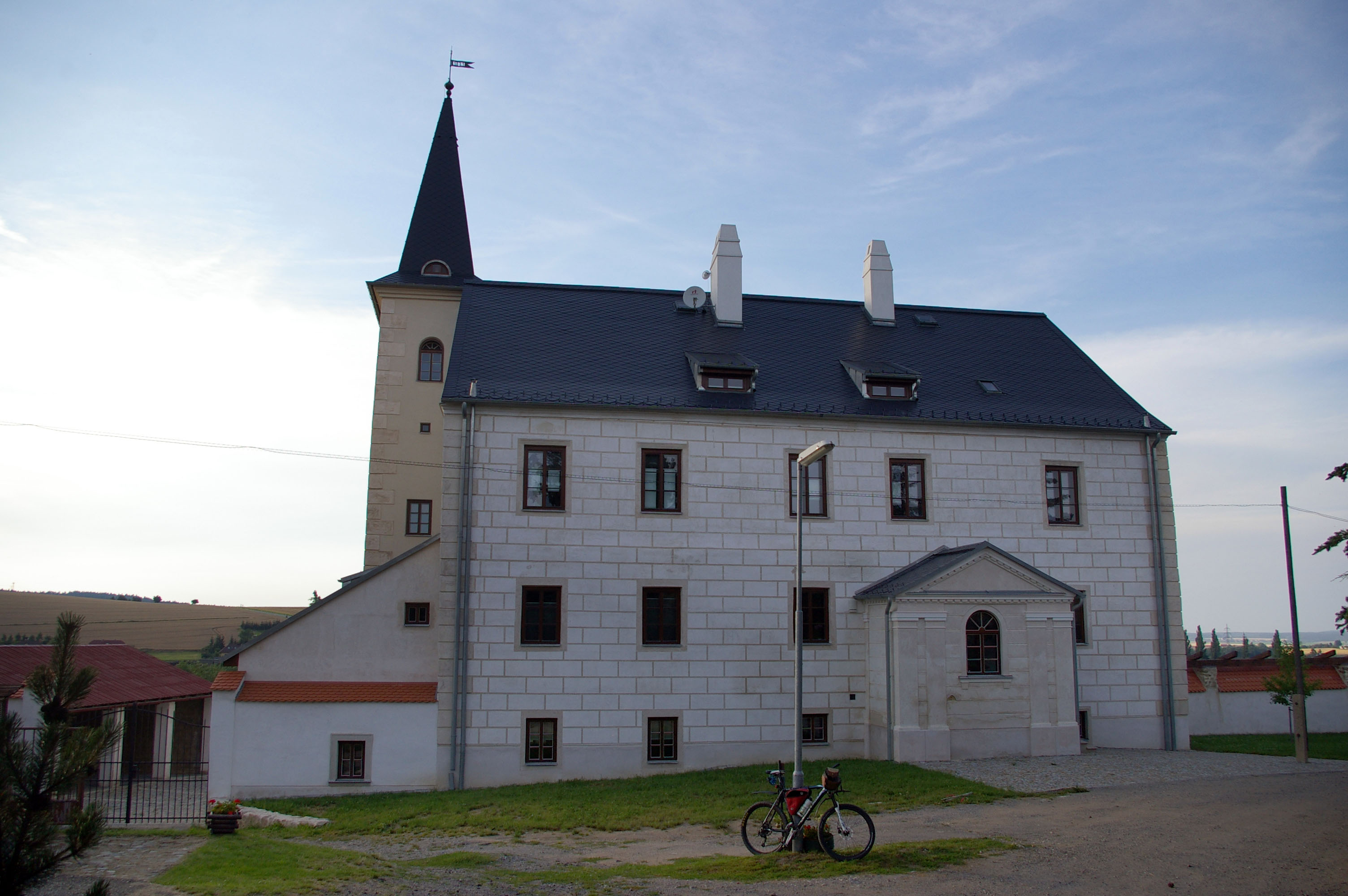 Zámek Příseka